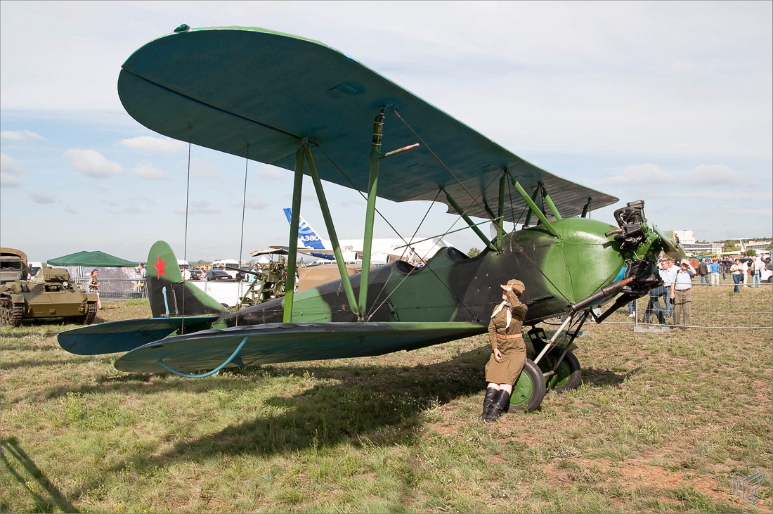 Ночная ведьмочка. По-2. MAKS-2011.